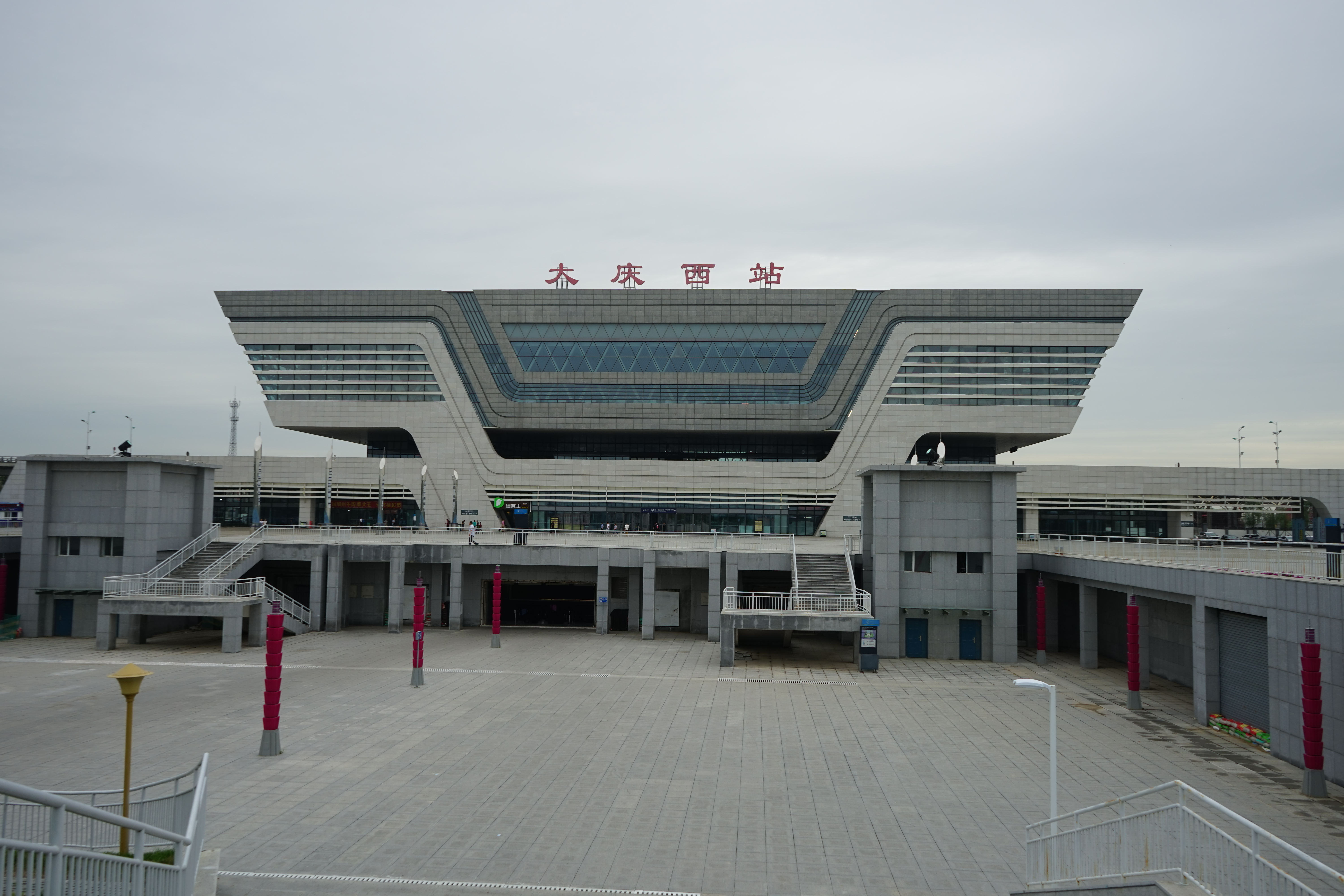 中文（中国大陆）: 大庆西站。